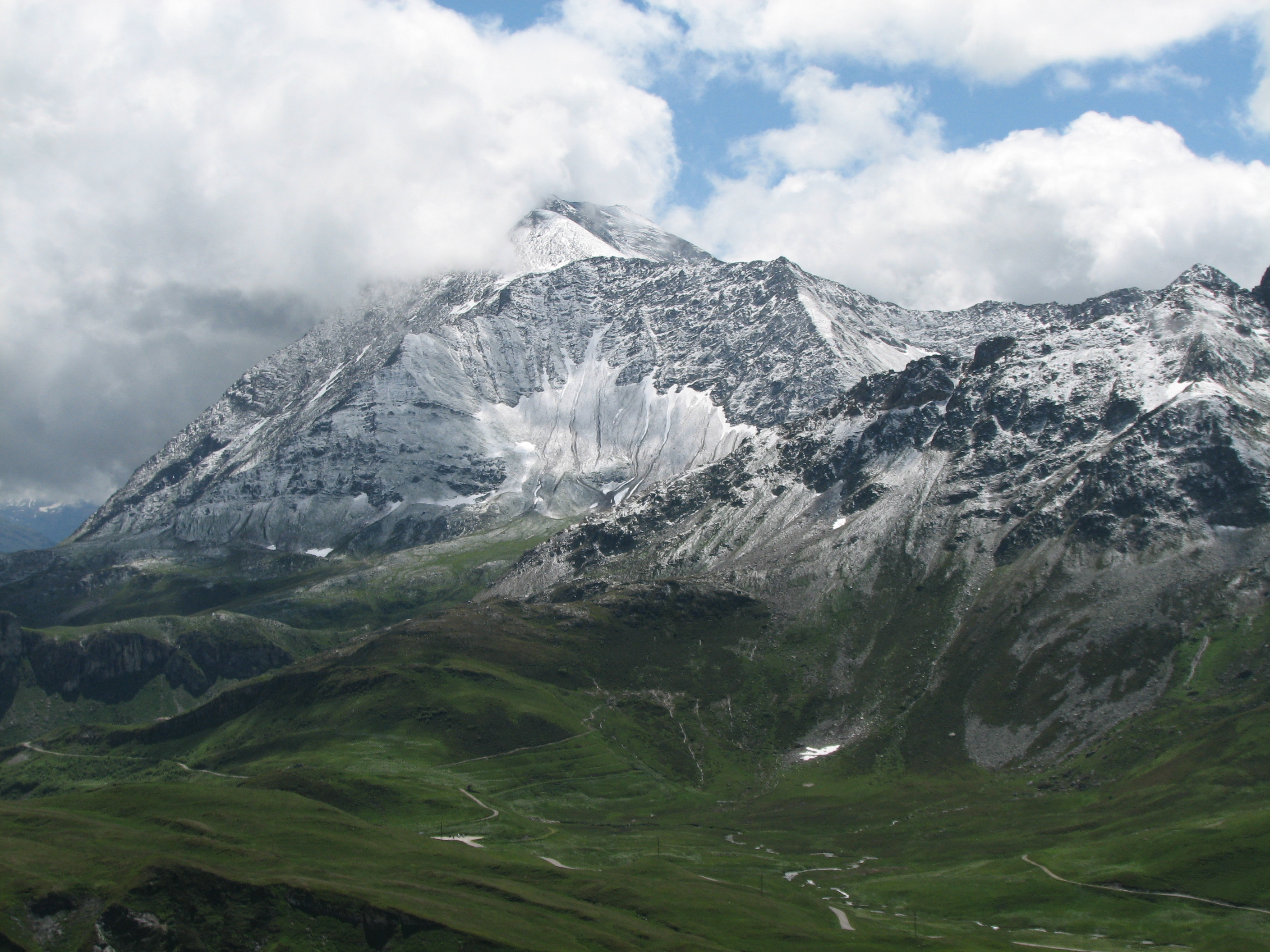 Pointe de la Terrasse vue depuis le Rocher du Vent